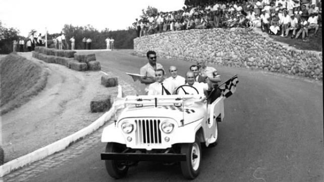 Juan Manuel Fangio manejando un Jeep en el Parque Sarmiento (año 1960)